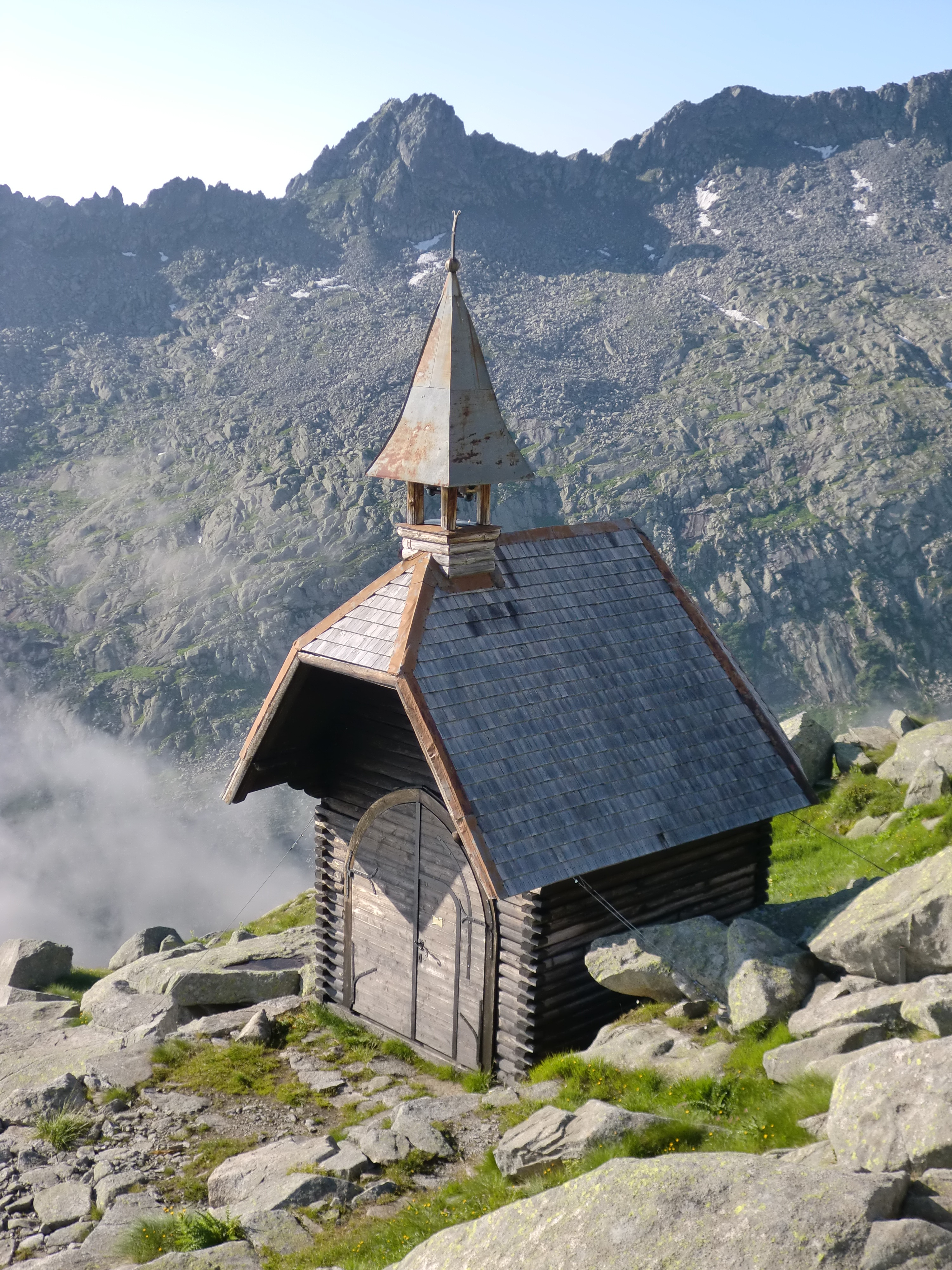 Chiesetta Alpina al rifugio Carè Alto